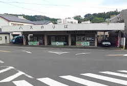 壱岐交通 新道バスのりば